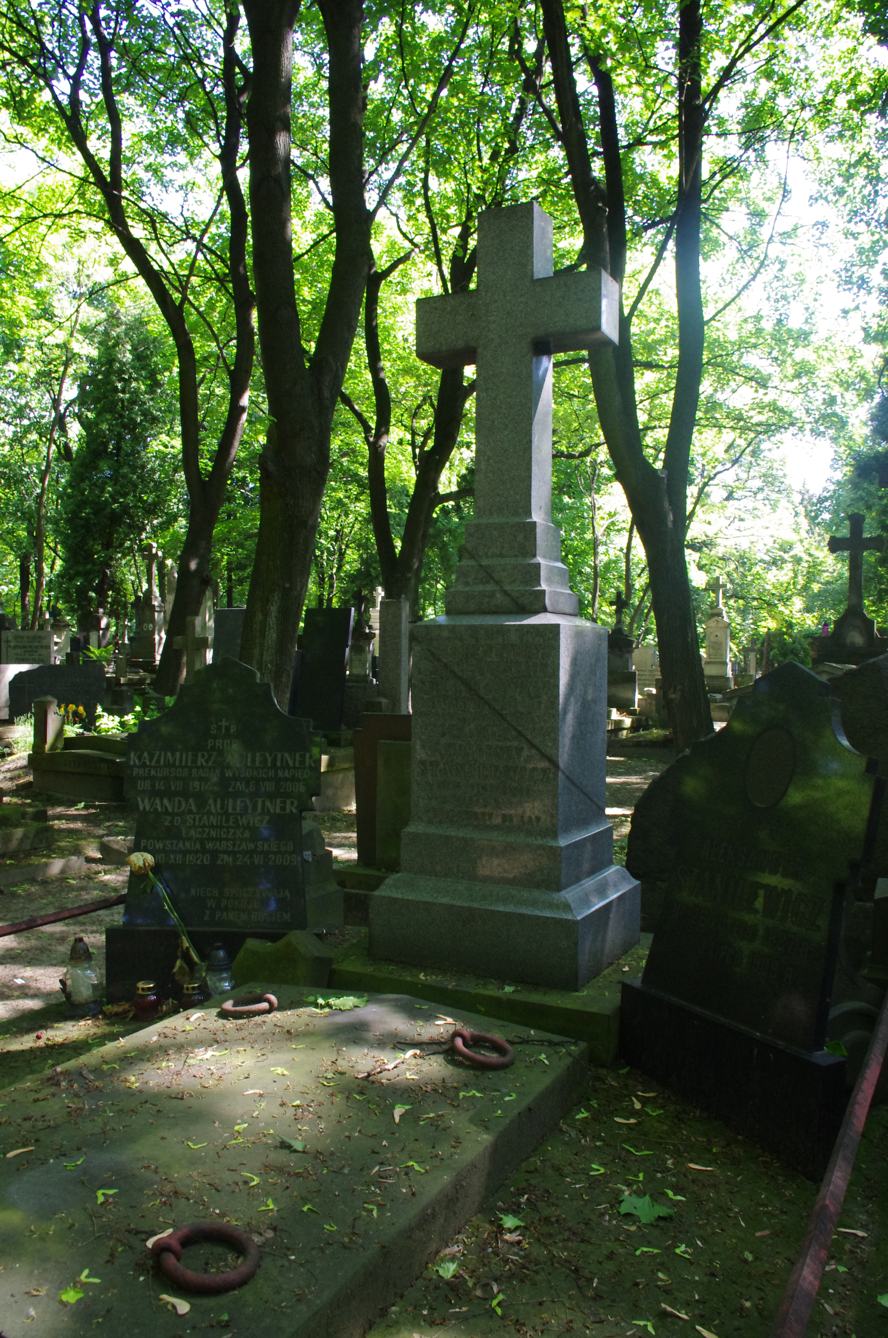 Grób prof. Kazimierza Auleytnera na Cmentarzu Powązkowskim w Warszawie